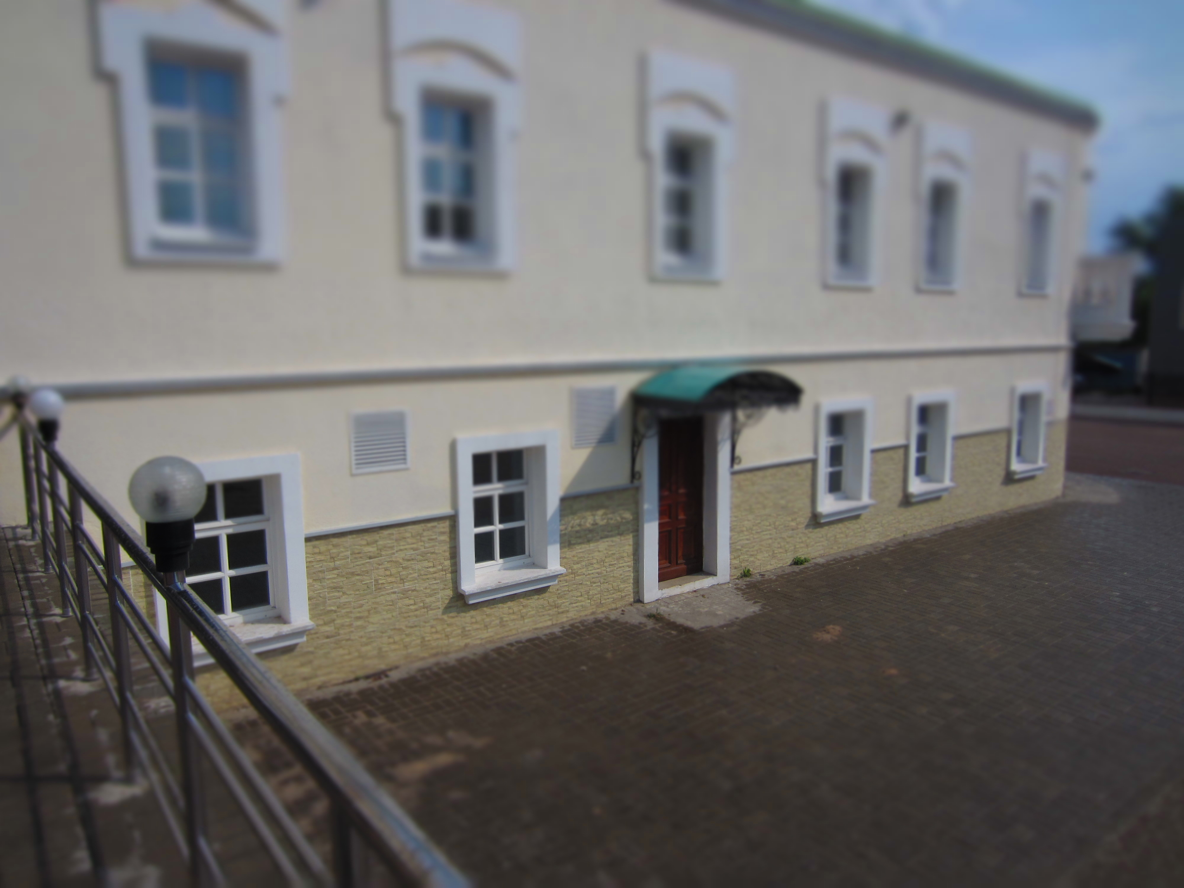 Часть здания конторы, входящей в усадебный комплекс Баташевых. Полностью реконструированное в 2006-2008 г.г. здание. На данный момент в здании располагаются административные помещения, ресторан "Аристократ" и помещения кухни гостиницы "Баташев"